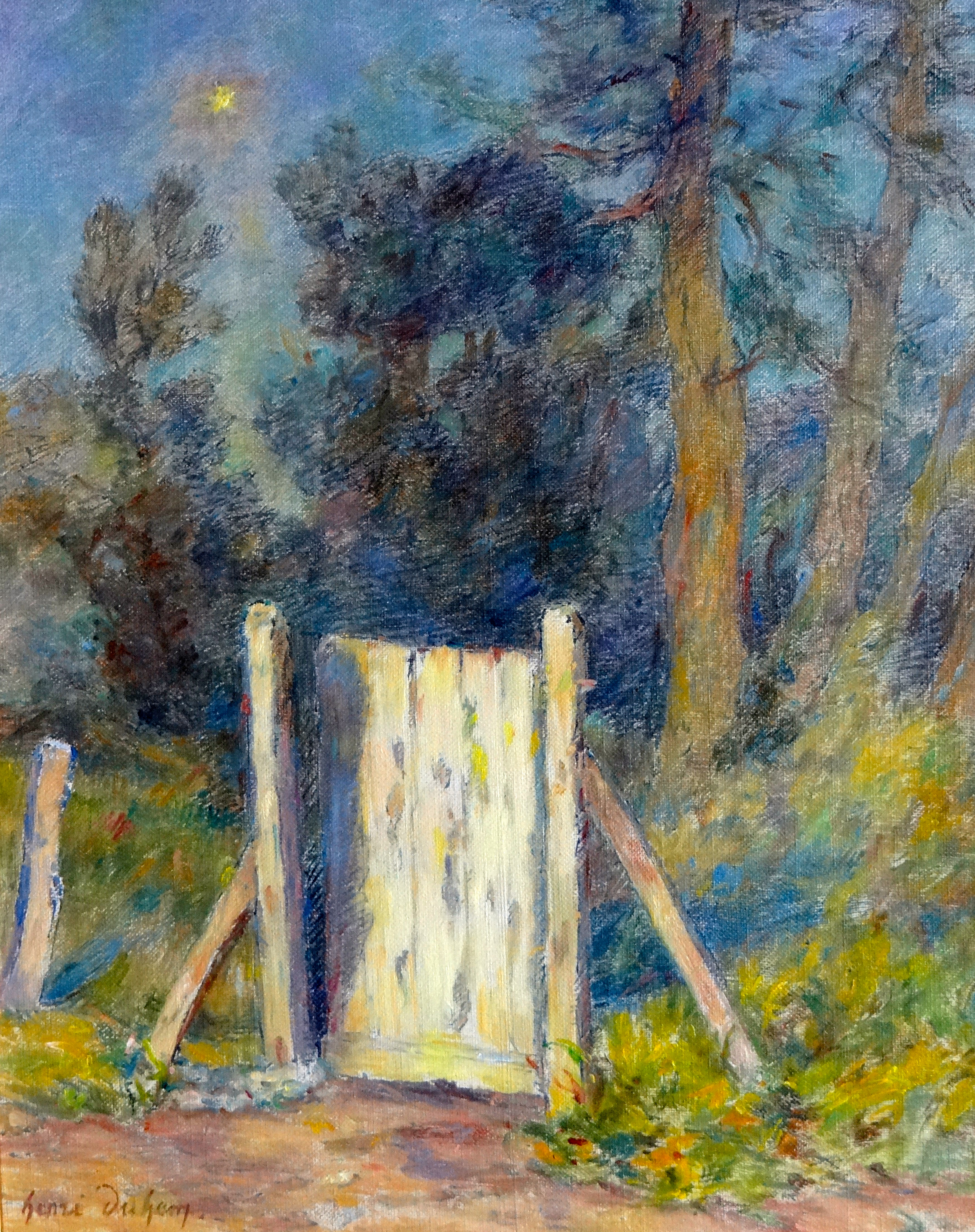 La Porte